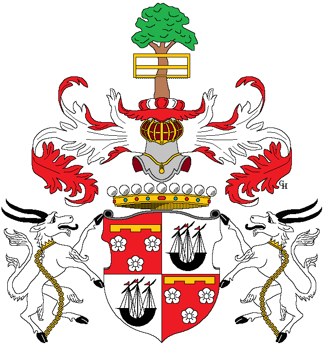 Wappen des kurpfälzischen und kaiserlich-österreichischen Staatsmanns schottischer Herkunft Johann Jakob von Hamilton (1642–1717), verliehen anlässlich seiner Erhebung in den Reichsgrafenstand 1695. Zeichnung von Gerd Hruška ( Für weitere Informationen zu dieser Standeserhebung siehe (